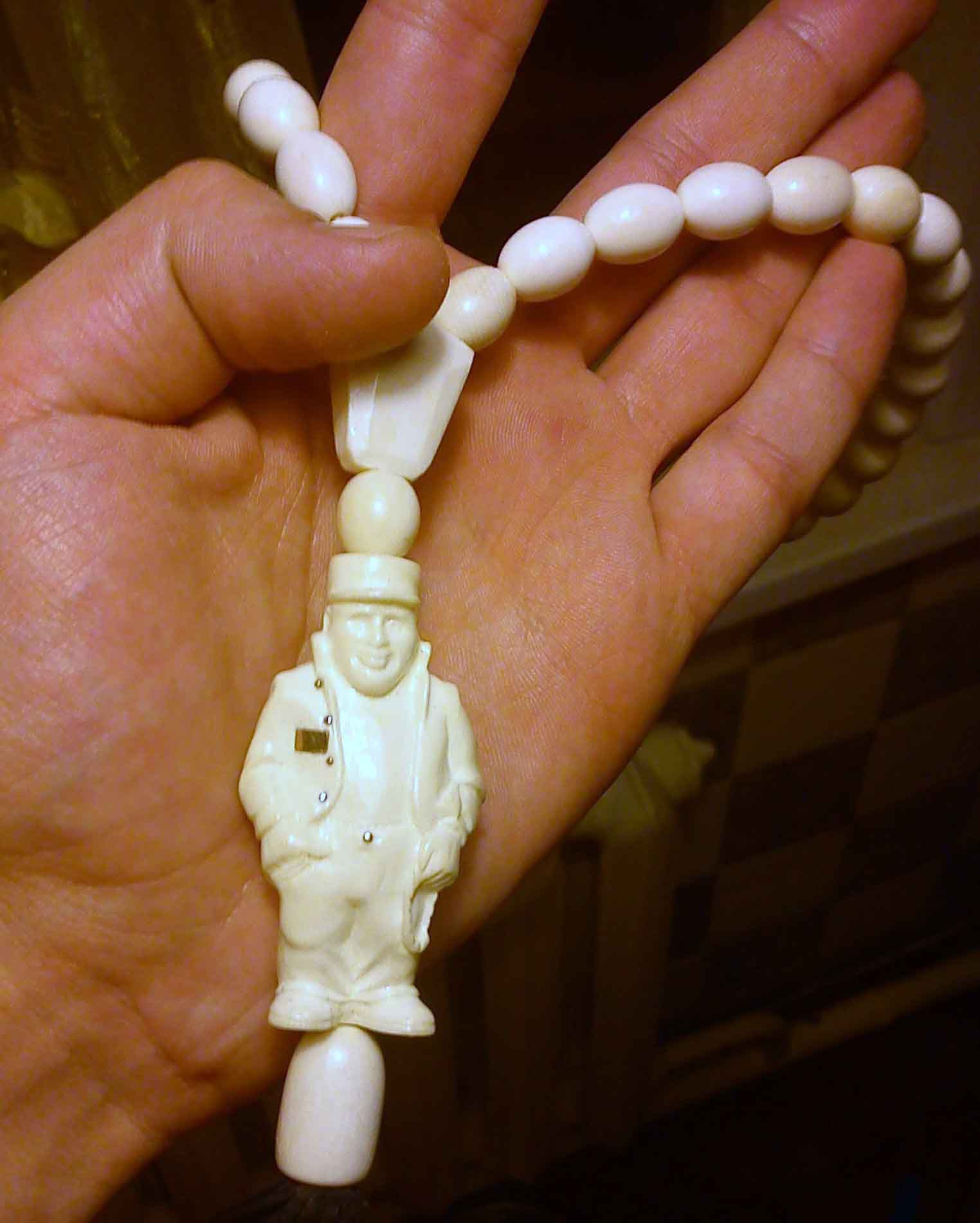 Чётки сделанные в местах лишения свободы. Вариант северных лагерей, кость шита золотом.